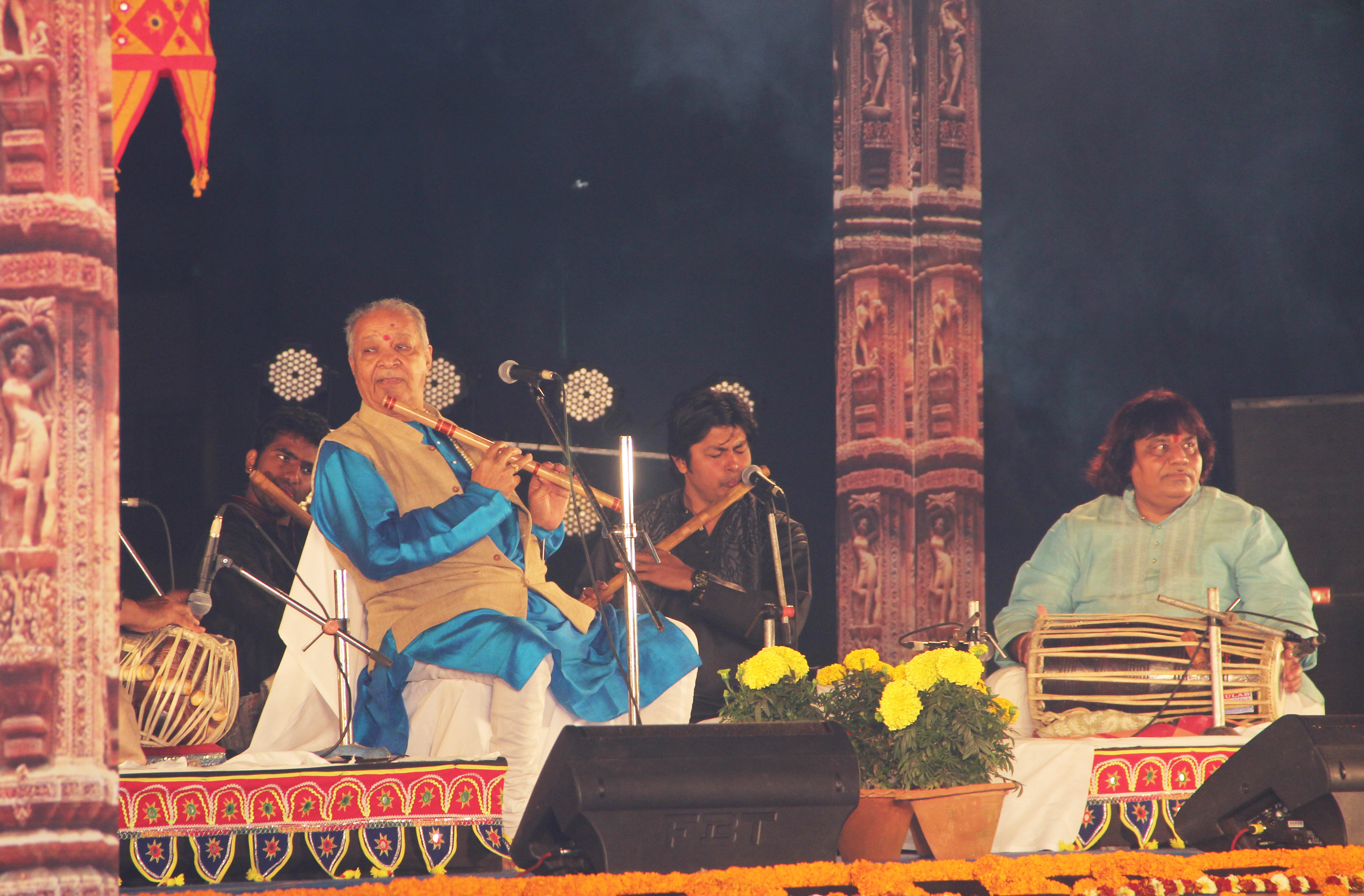 ଓଡ଼ିଆ: Pandit Hariprasad Chaurasia Performing at Rajarani Music Fest, Rajarani Temple, Bhubaneswar, Odisha, India